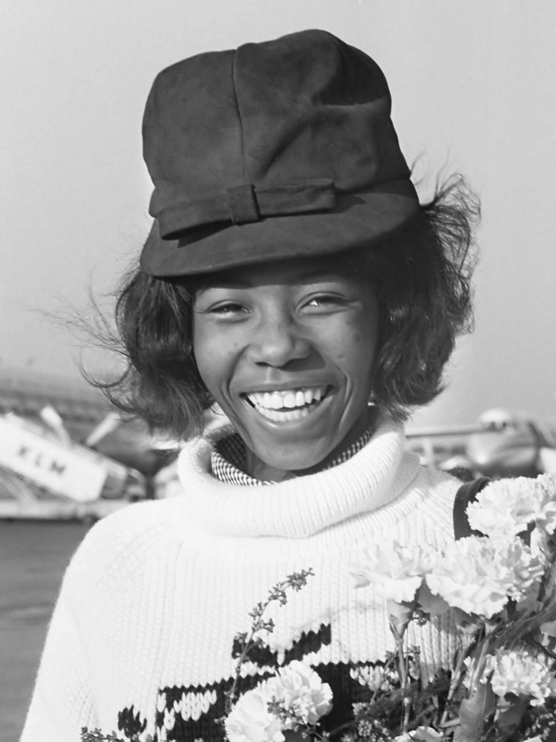 Aankomst Milly Small uit Jamaica op Schiphol, deelneems Grand Gala du Disque 2 oktober 1964